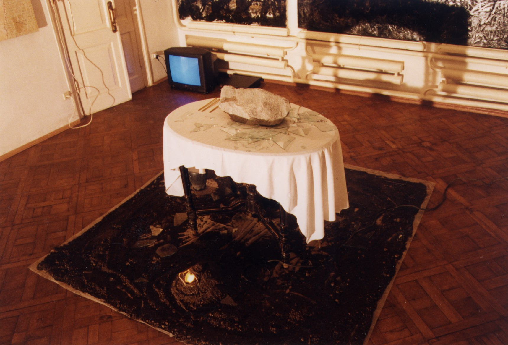 Фото з виставки Василя Бажая "Пьяно-Форте III"